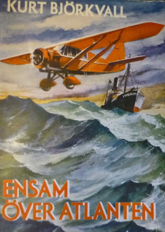 Avfotograferat bokomslag till Ensam över Atlanten av Kurt Björkvall